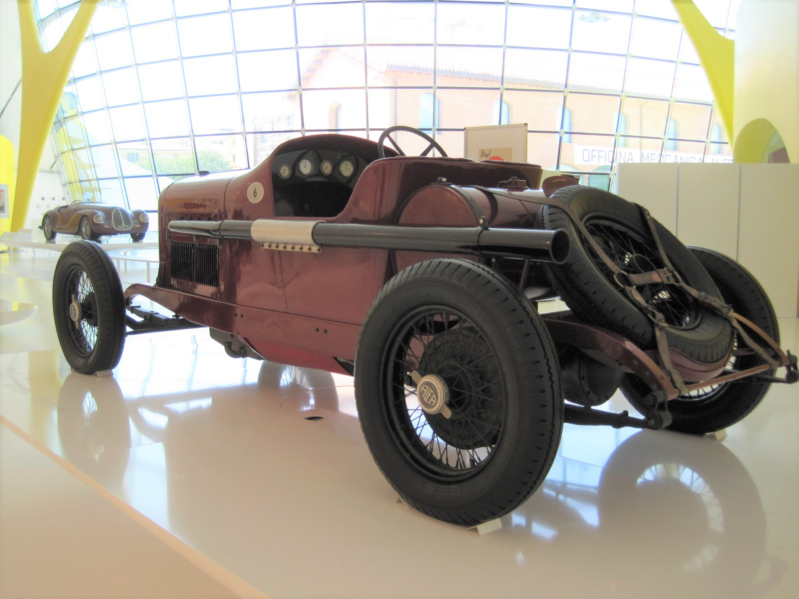 Automobiles in Enzo Ferrari Museum in Modène - Alfa Roméo 40-60 / 1914